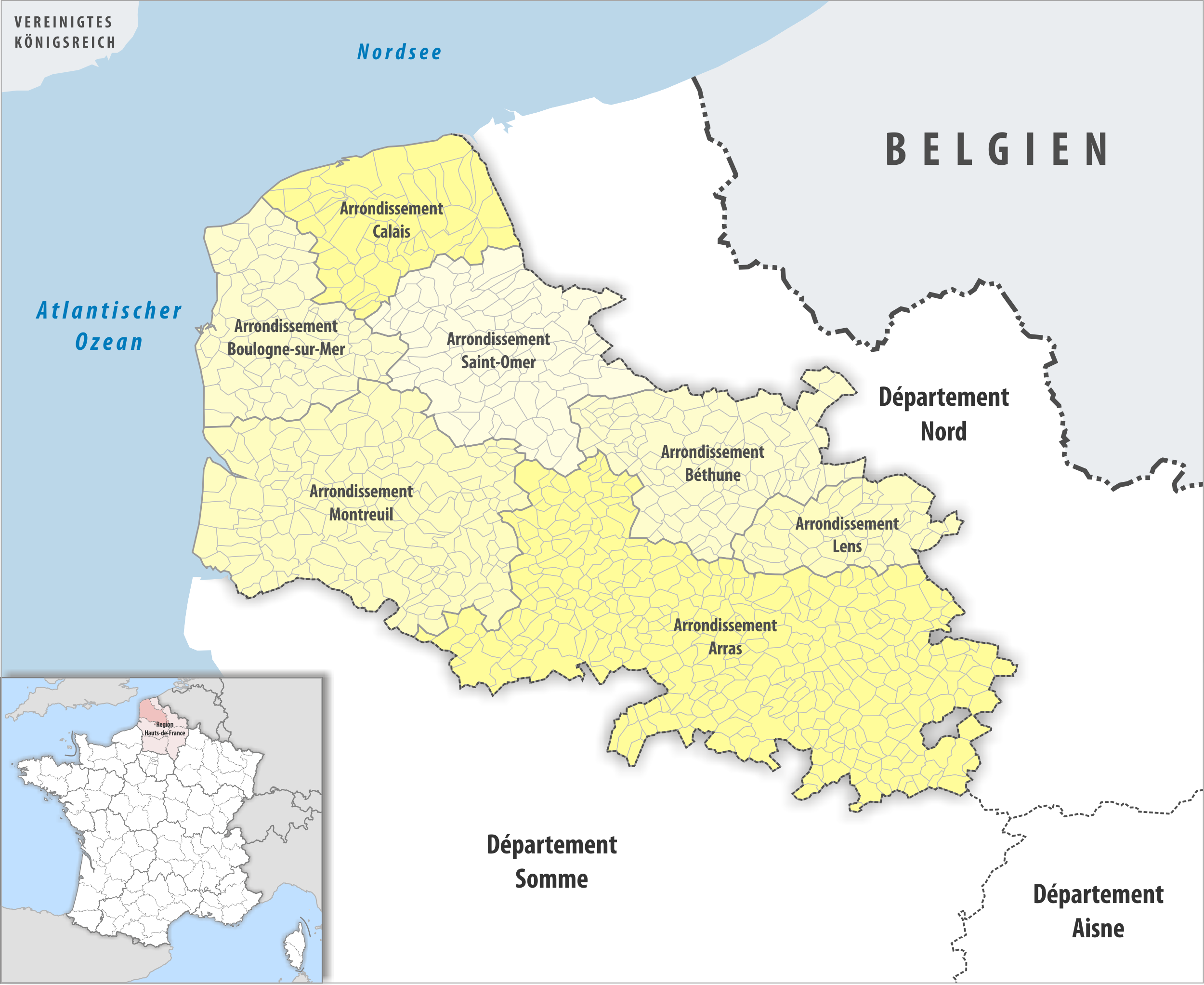 Gemeinden und Arrondissemente im Departement Pas-de-Calais